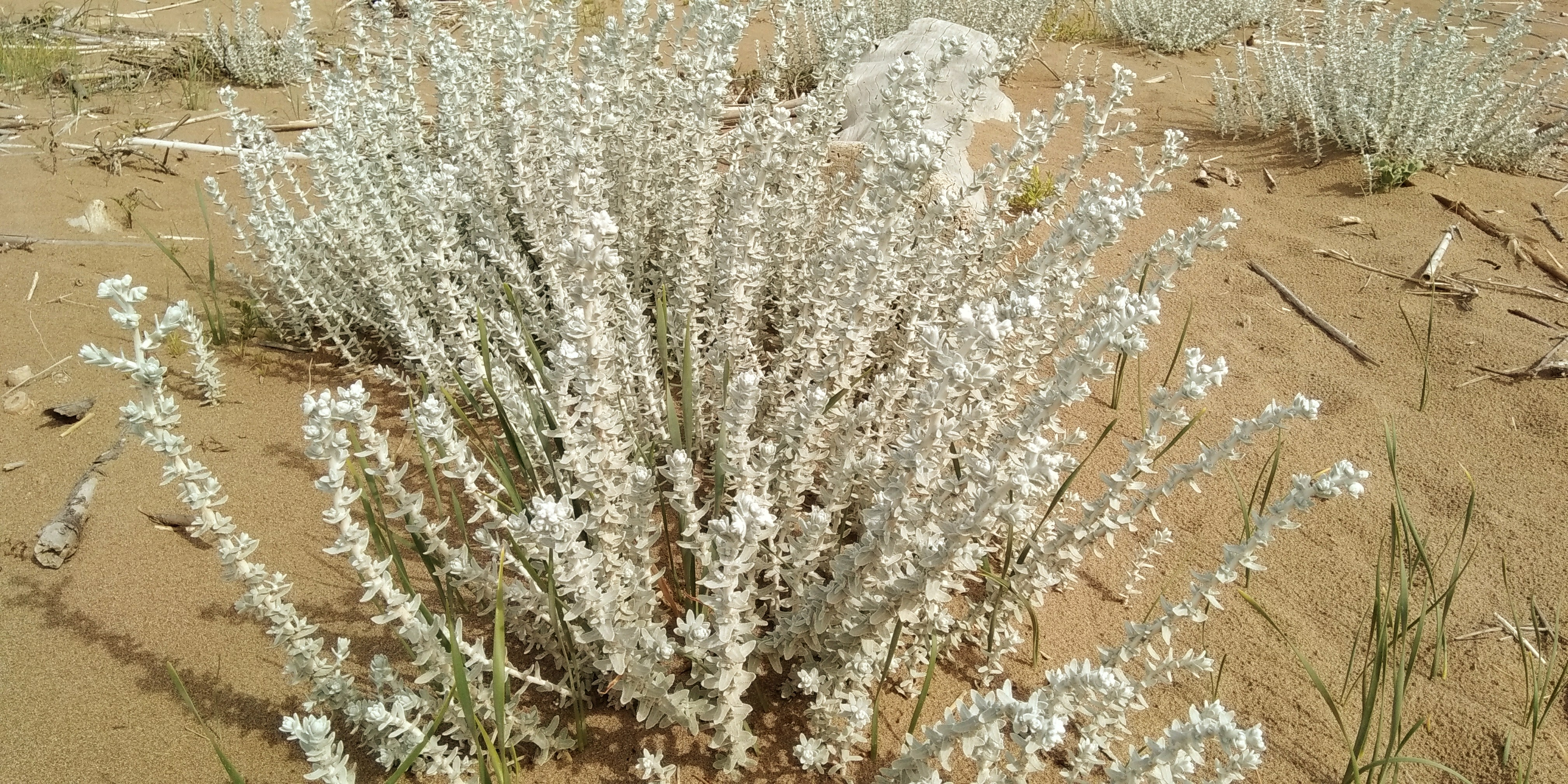 Achillea maritima au bord de la plage de Kakovatos